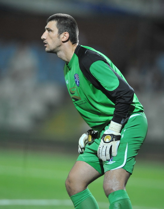 Дaмиp Kaxpимaн — сербский футболист.